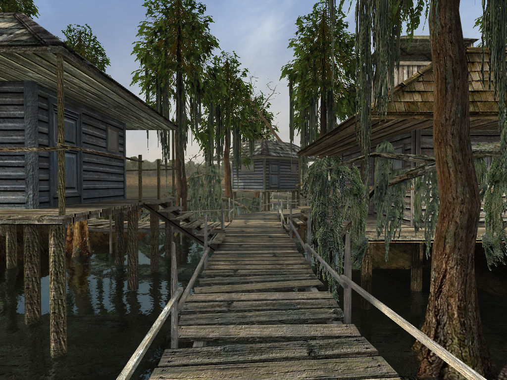 Capture d'écran du jeu Sherlock Holmes : la Nuit des Sacrifiés. Capture prise près de la cabane de "Champagne", à la Nouvelle-Orléans. Cela donne une idée du gameplay du jeu.